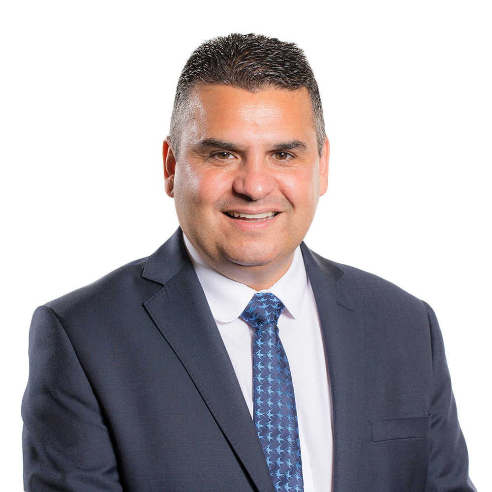 Plaid: Plaid Cymru Rhanbarth: Canol De Cymru Party: Plaid Cymru Region: South Wales Central